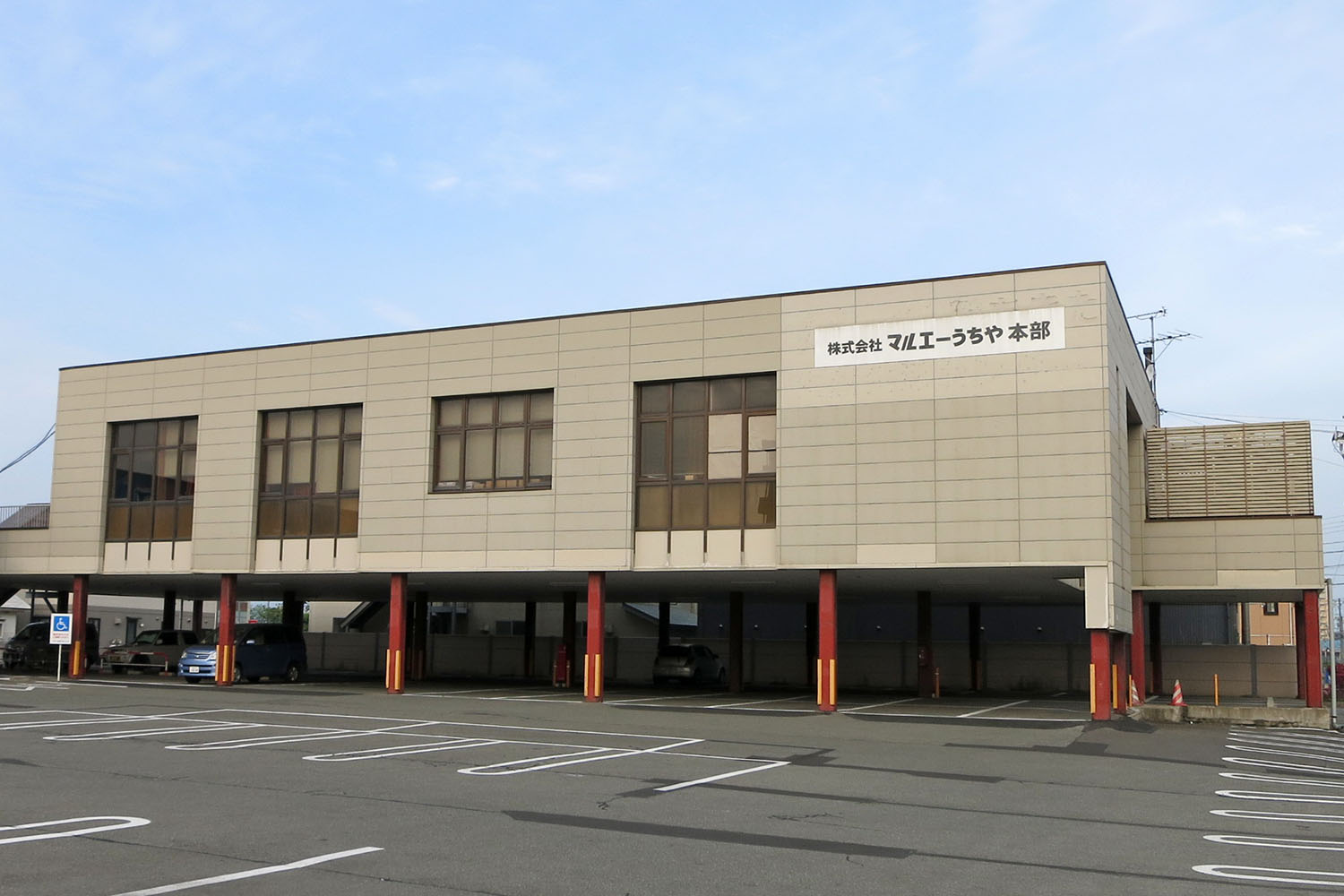 マルエーうちや本社（秋田市泉北）